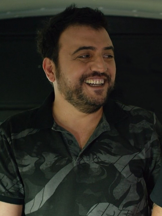 "İlk Buluşma" televizyon programı tanıtımında Şinasi Yurtsever